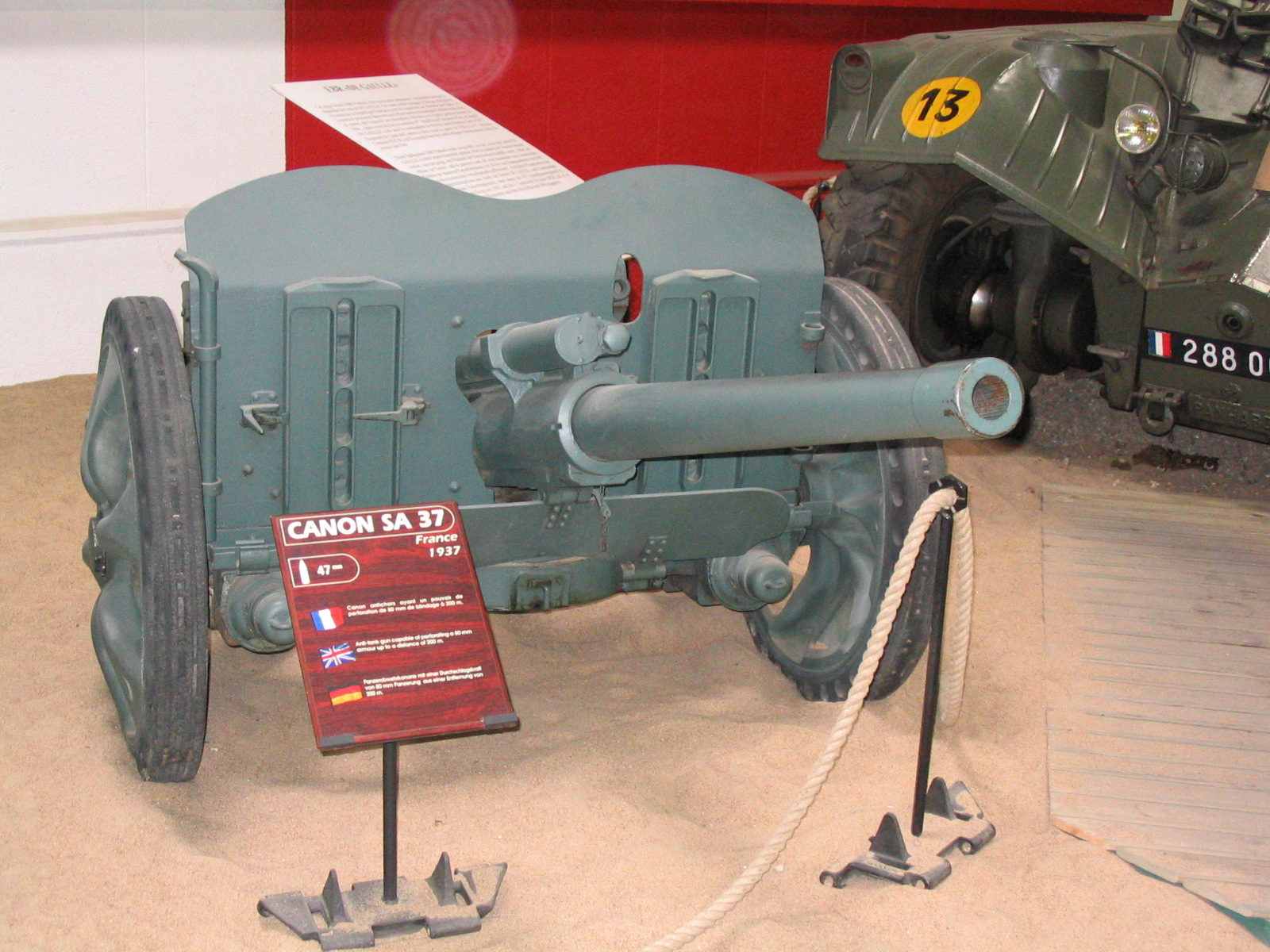 The 47 mm SA mle 1937 antitank gun at Saumur museum